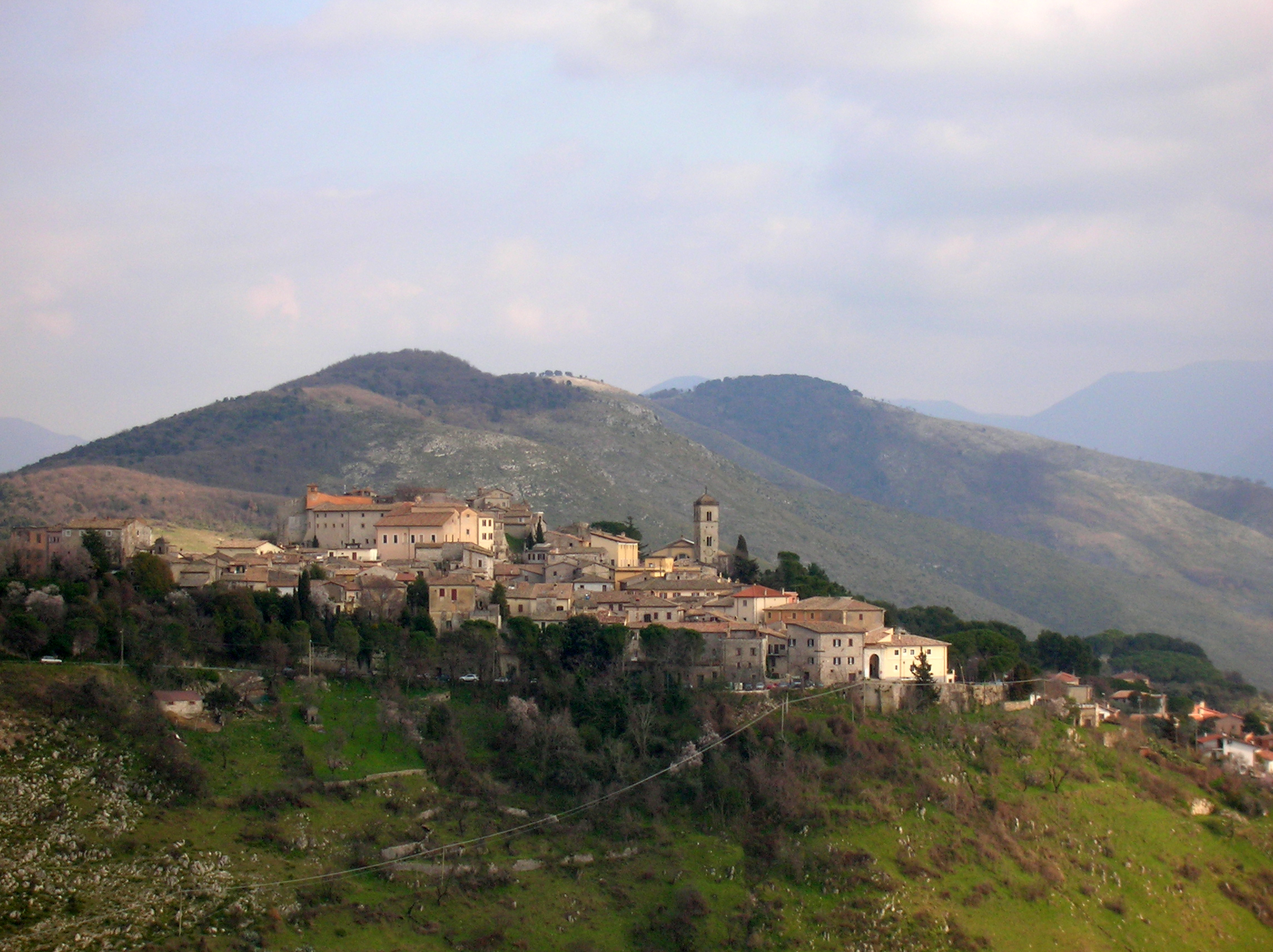 Ruderi di San Martino (Fara in Sabina)